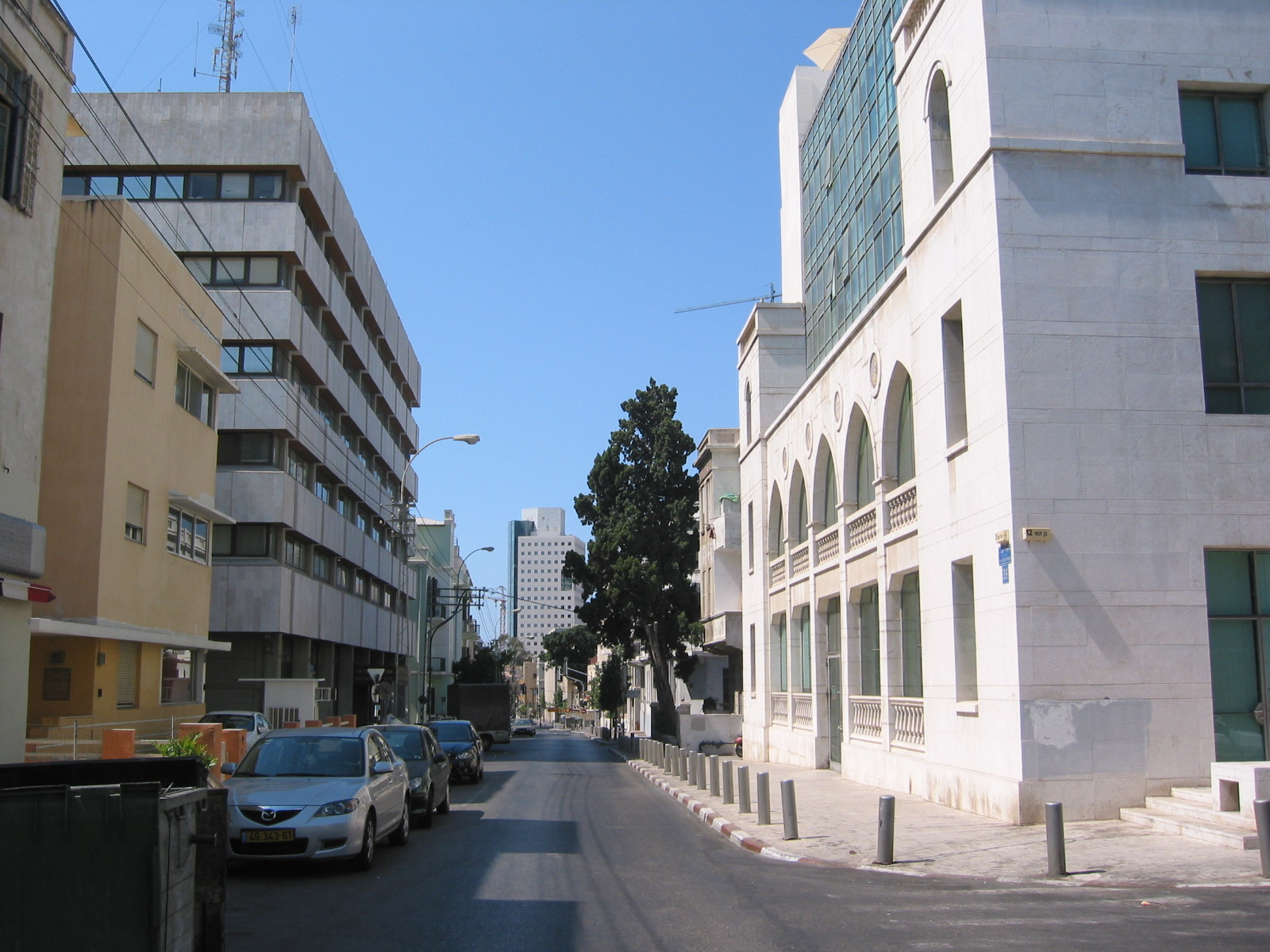 Tel Aviv Stock Exchange in Ehad Haam Street